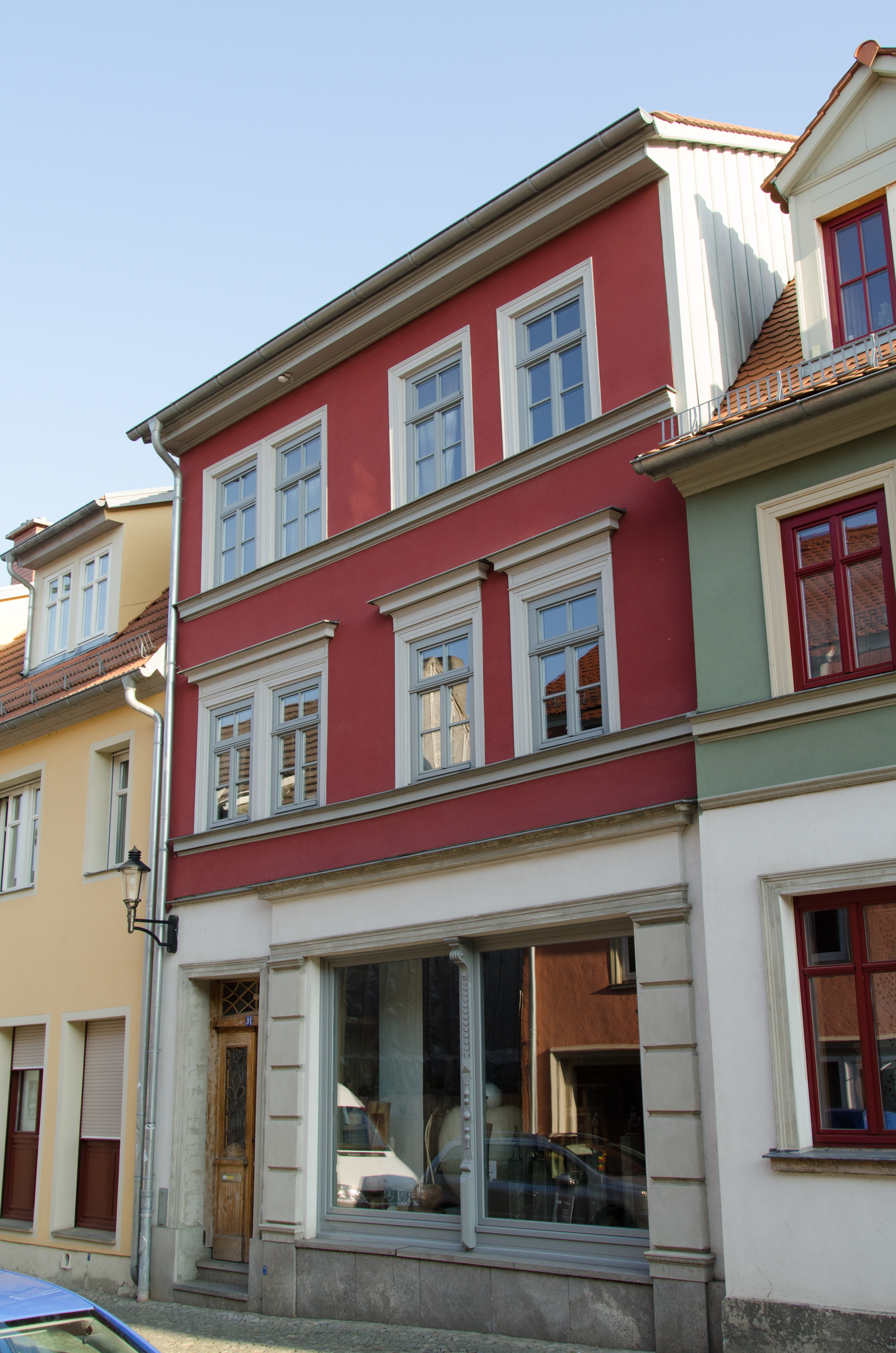 Naumburg, Michaelisstraße 91